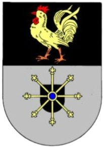 Wappen der Ortsgemeinde Benzweiler